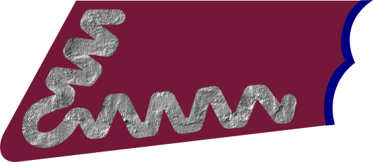 Łapka piechoty na kołnierz kurtki w latach 1949 -1952